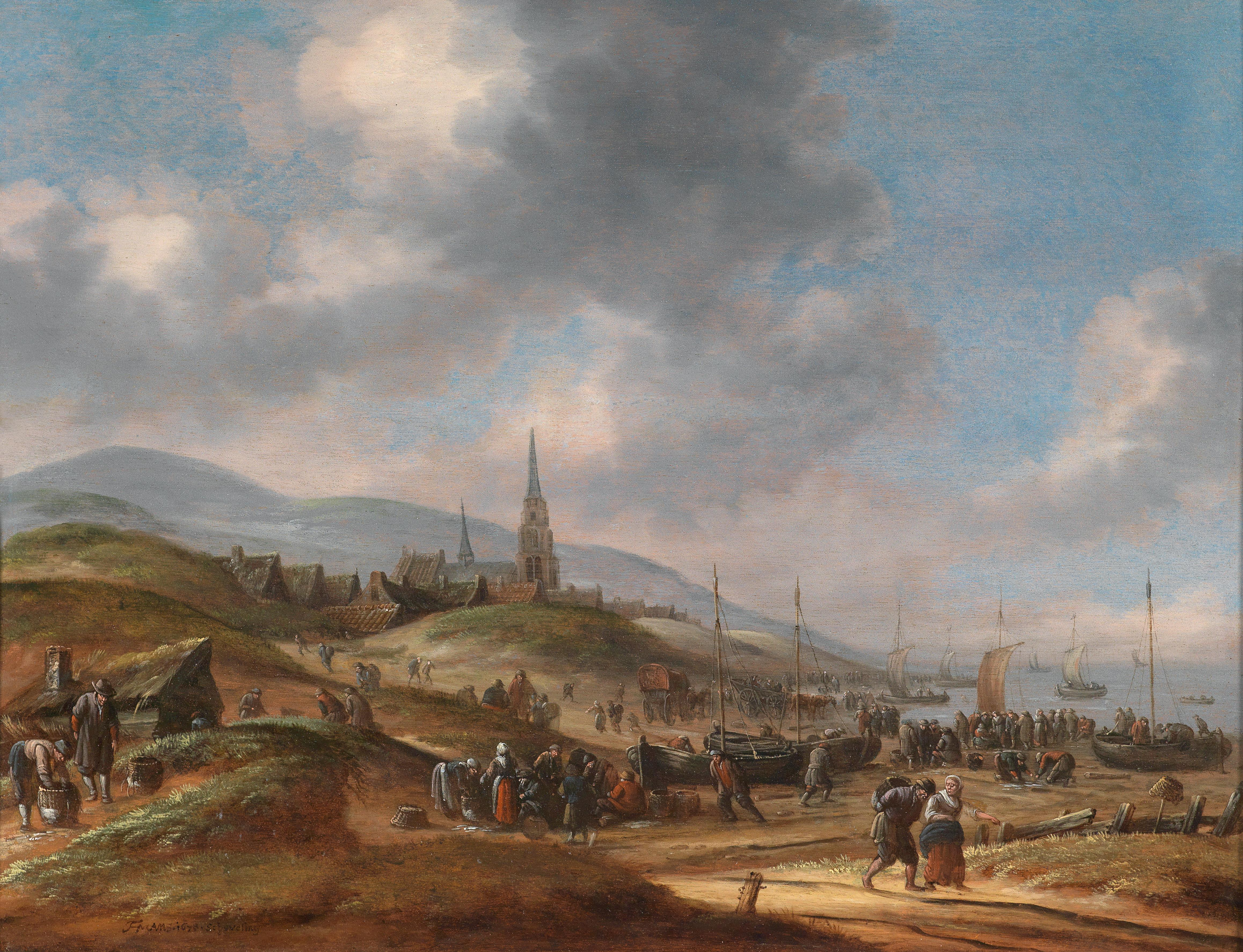 Ansicht des Strandes bei Scheveling, signiert und datiert unten links: THMANS 1678. Scheveling (THM ligiert), Öl auf Holz, 33,4 x 43,2 cm